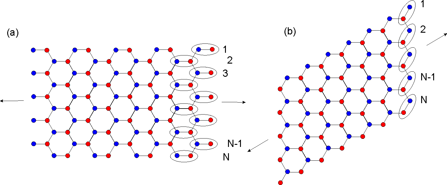 Zigzag and armchair nanoribbon